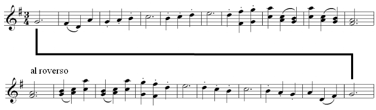 Deel 3 (menuet al roverso) uit de symfonie N° 47 van J. Haydn